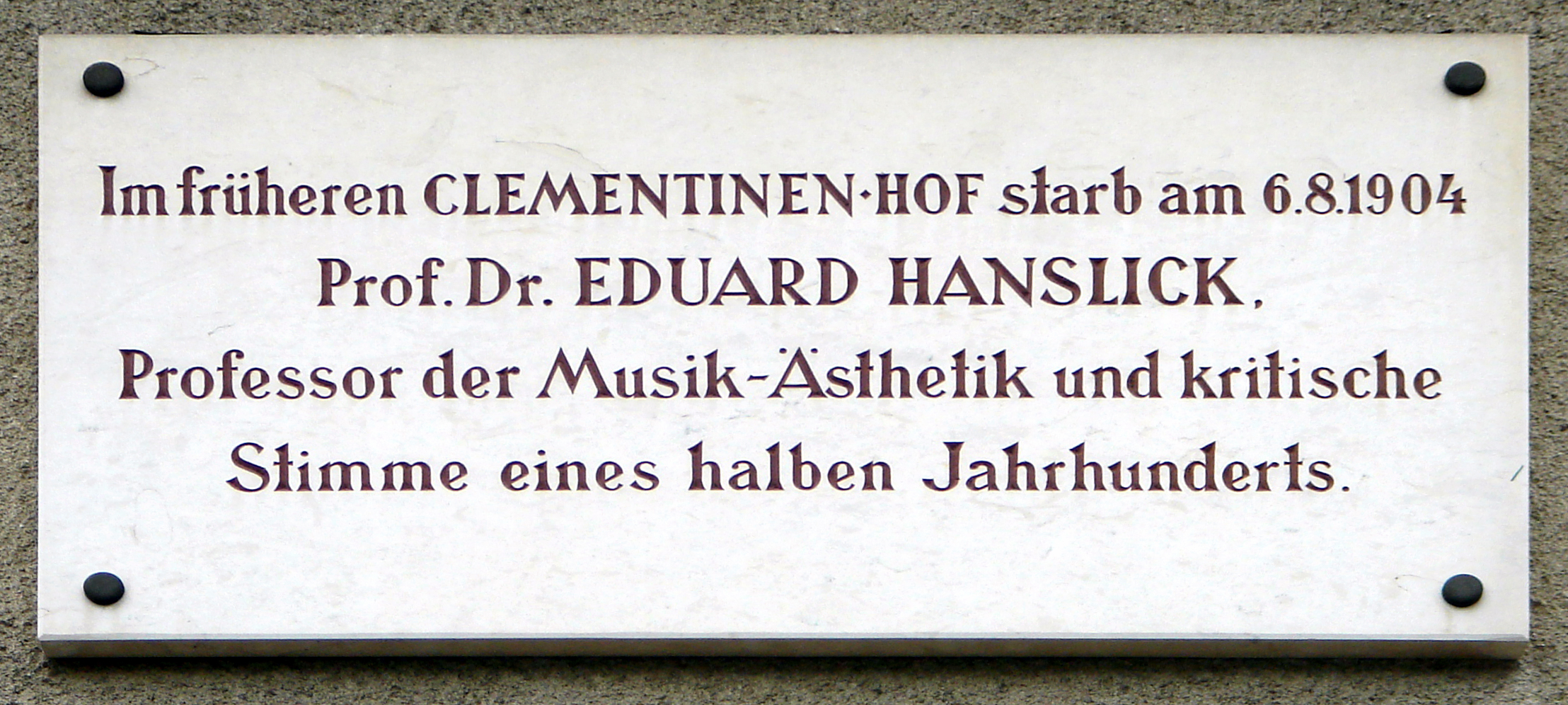 Baden bei Wien, Kaiser-Franz-Ring 12, ehem. Clementinen-Hof, Erinnerungstafel für Eduard Hanslick